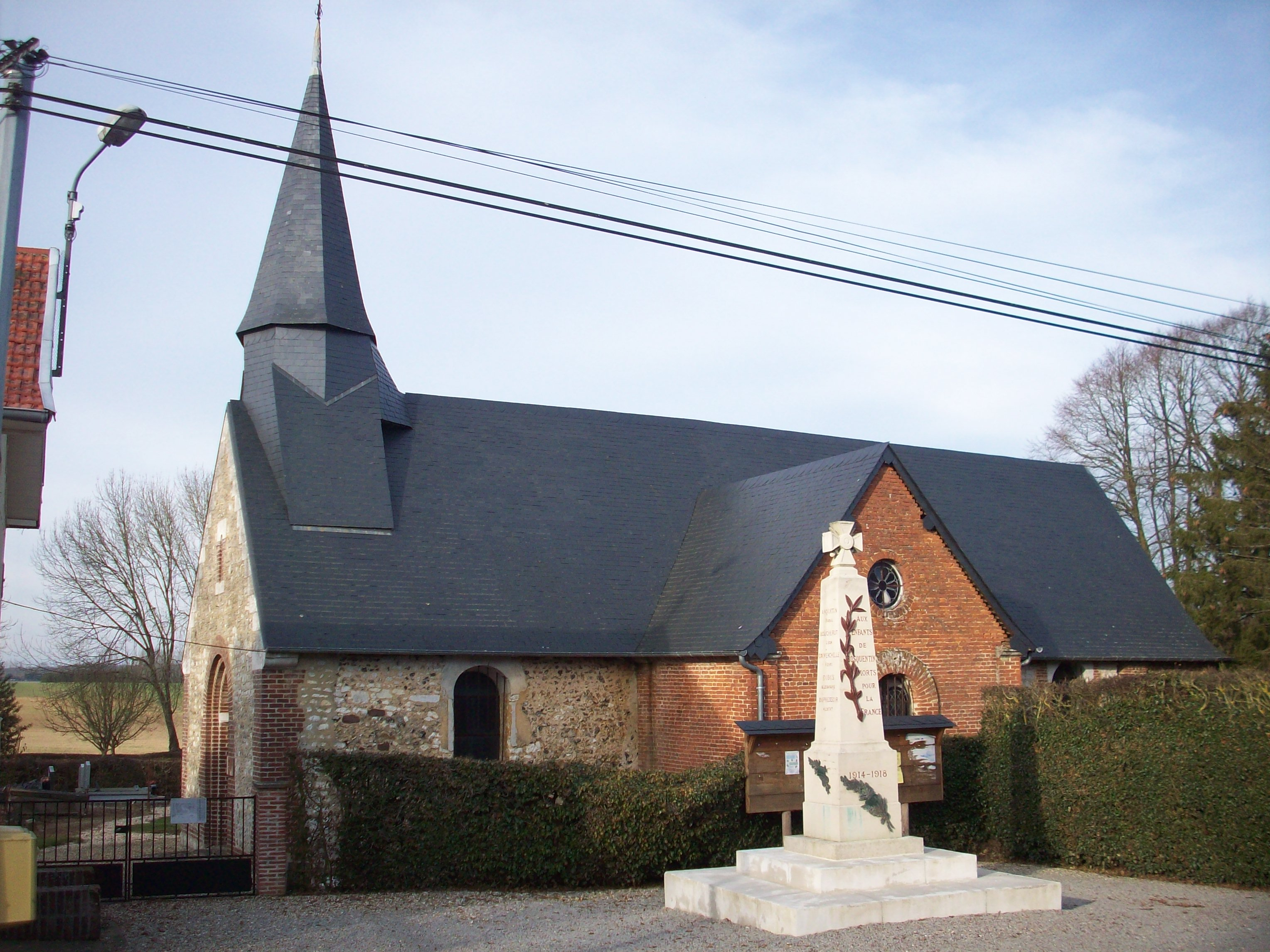 Église Sainte-Anne